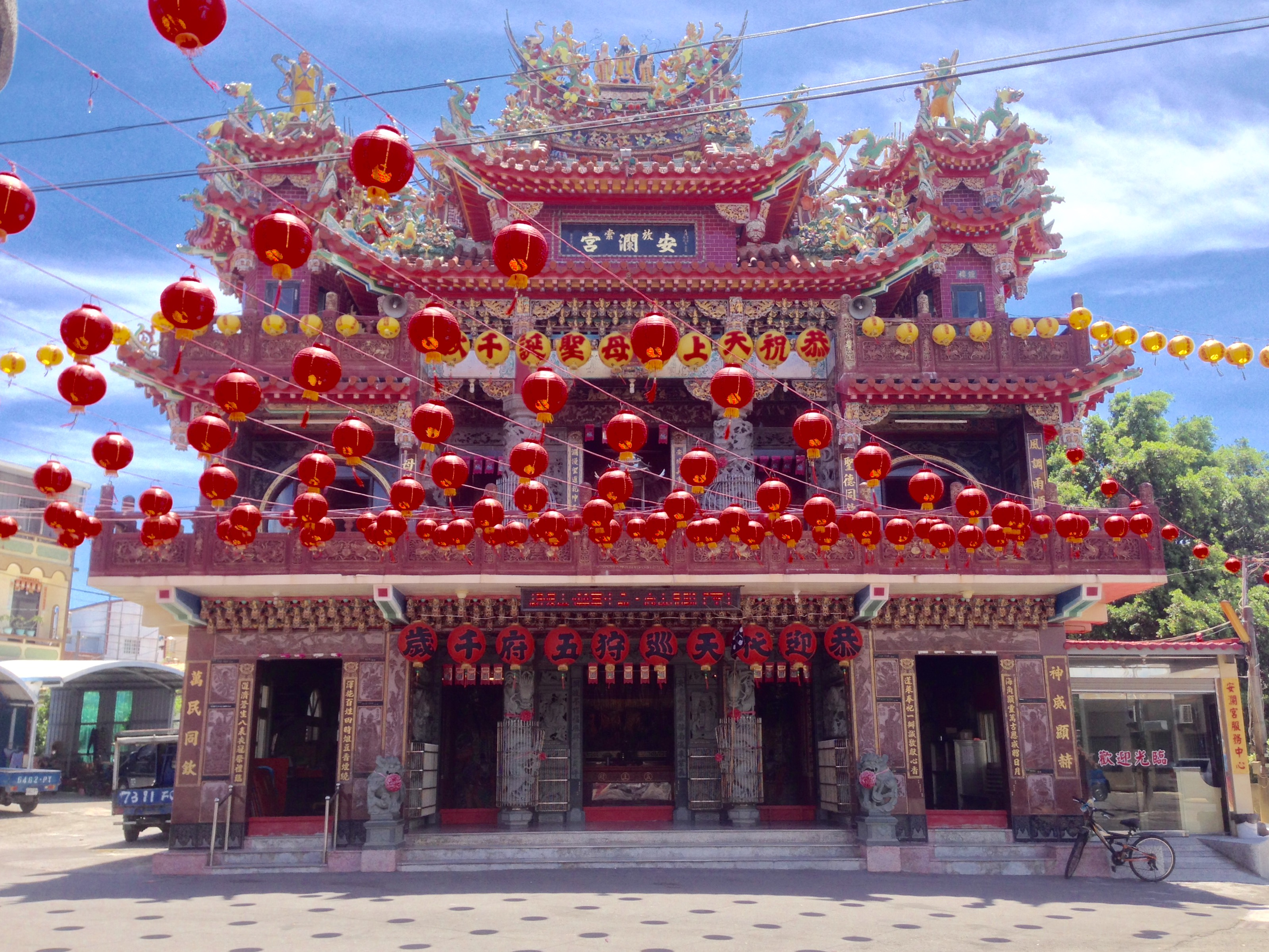 中文（台灣）: 放索安瀾宮